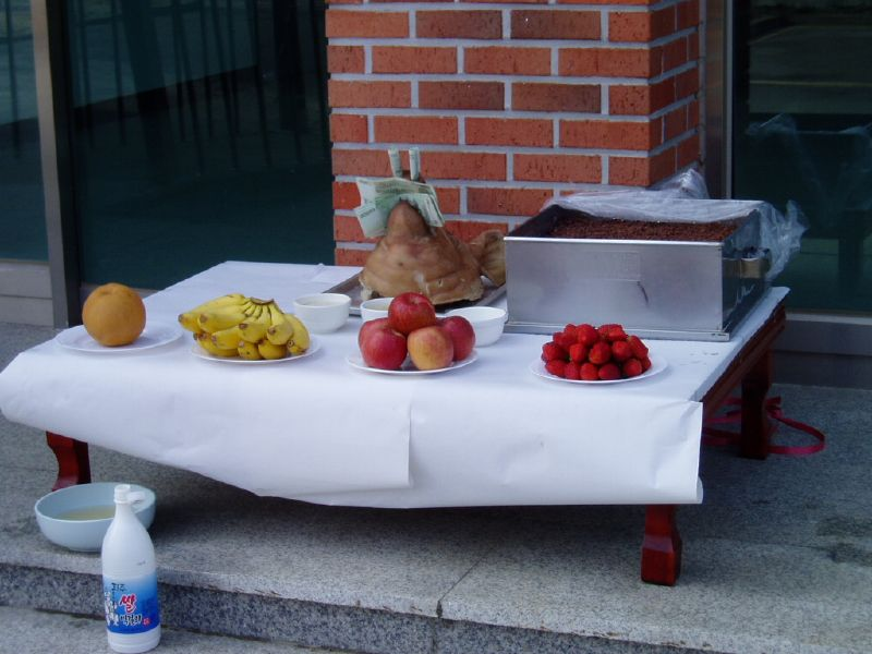 Korea-Gosa